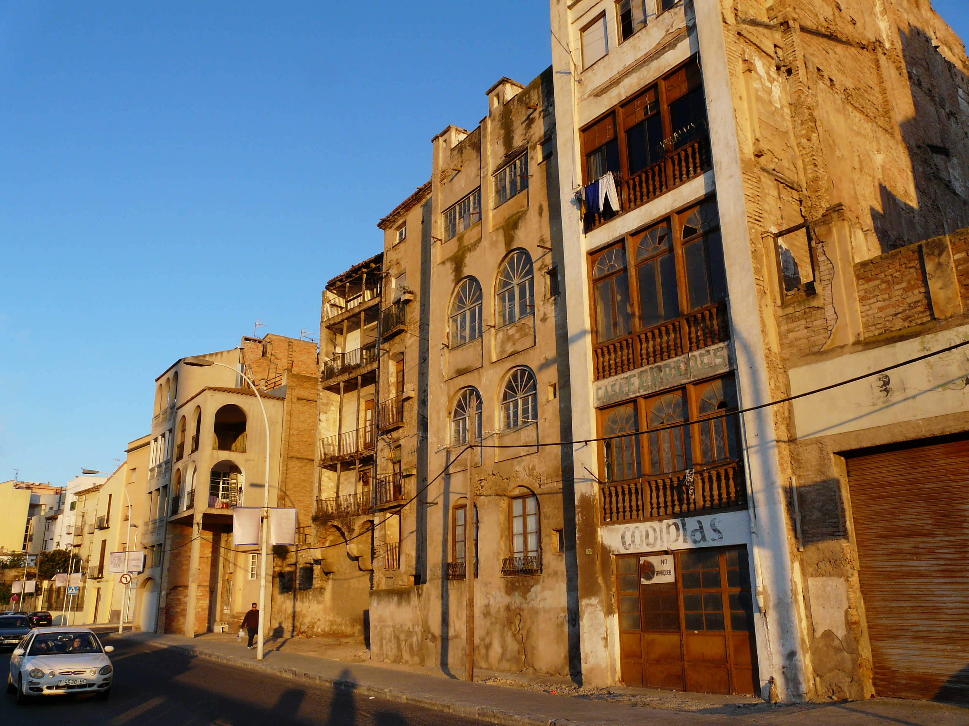 Habitatge Casa Ferreres (Tortosa) Object location40° 48′ 51.43″ N, 0° 31′ 18.26″ E